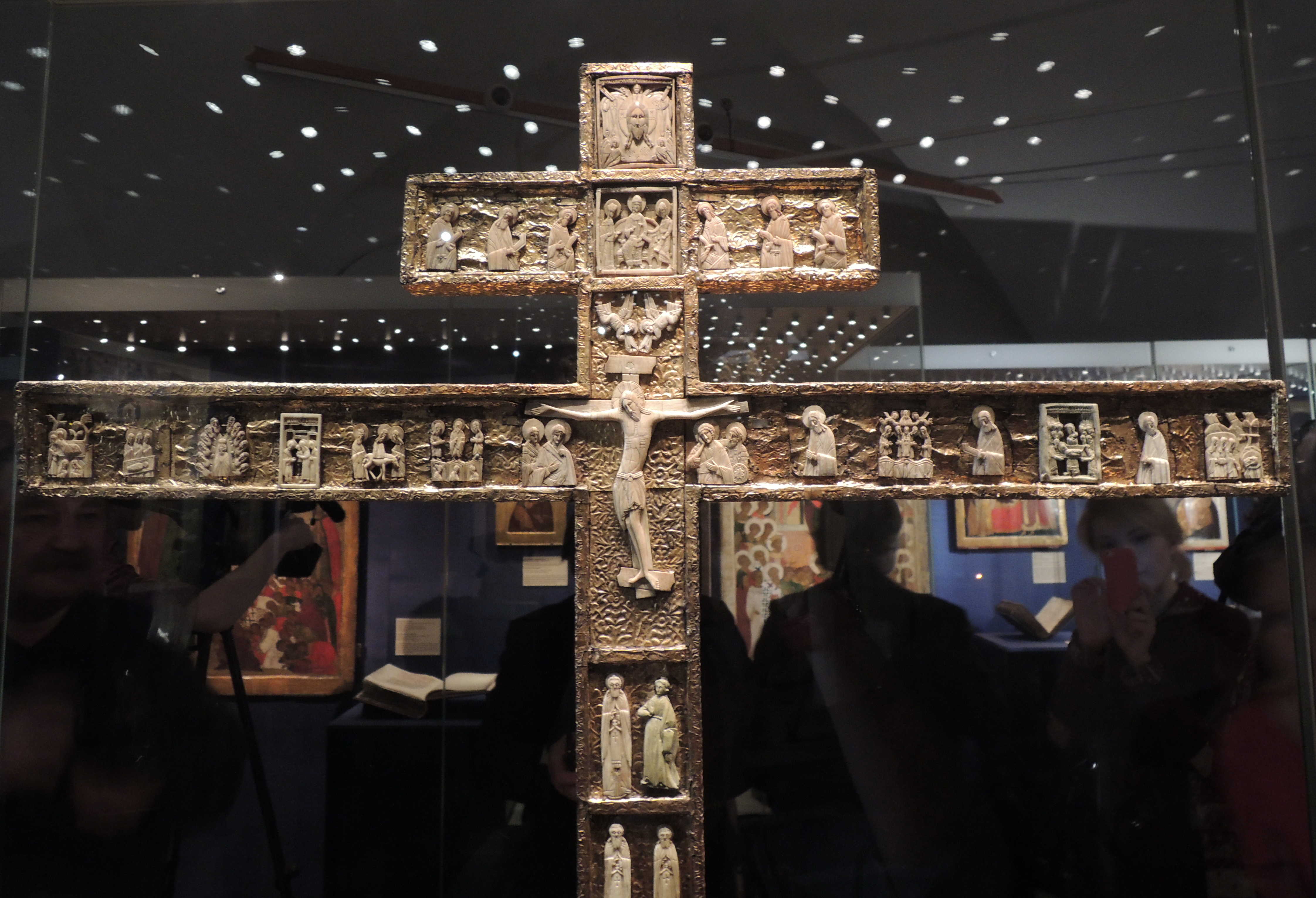 Крест "Киликийский". Москва (?), первая треть 16 века. Дерево, серебро, кость, басма, позолота, резьба, литье. Вологодский музей-заповедник. Запрестольный крест из вологодского Спасо-Прилуцкого монастыря получил название Киликиевского благодаря преданию о принесении его на Русь из малоазийской Киликии. Иконографическая программа отражает деятельность вел. кн. Ивана III по распространению культа святых - покровителей великокняжеской власти и особо чтимых в различных землях, возвышение которых способствовало бескровному установлению прочных связей между Москвой и уделами. Представлены византийские цари Константин и Елена, первые русские святые Борис и Глеб, ярославский князь Федор с сыновьями Давидом и Константином, причисленные к лику святых при Иване III, Ефрем Новгородский и Савва Вишерский. В руке мастера чувствуется влияние искусства Дионисия и художников его круга. В начале 16 века Иван III ходил с Киликиевским крестом на Казань. Возможно, его сын Василий III позднее вложил его в этот монастырь. Позднее, в 1552 году, Иван IV взял его в поход на Казань же.